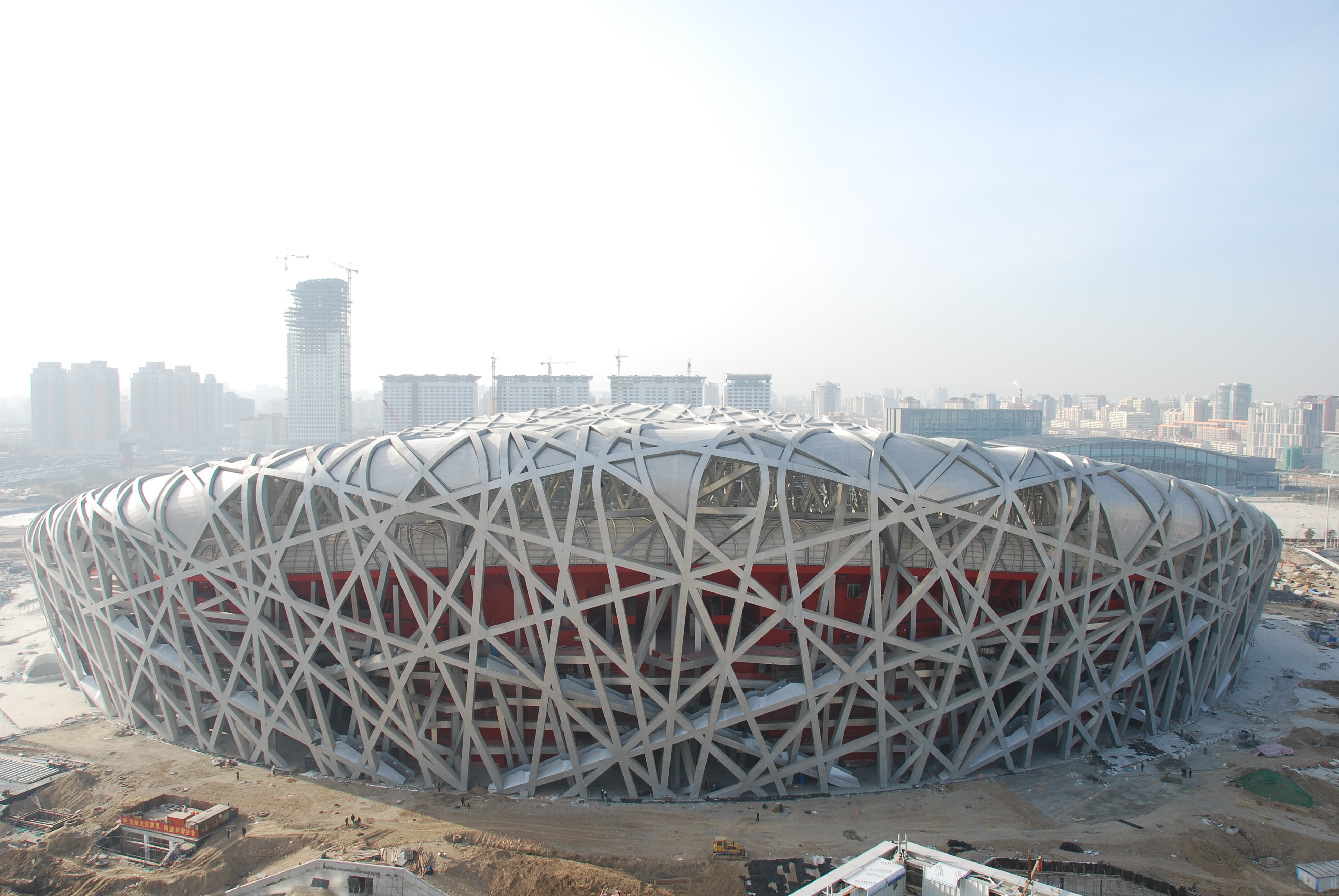 Bird's Nest, Beijing